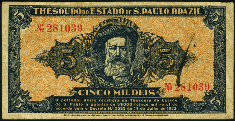 Cédula de 5 Mil-Réis emitida pelo Tesouro (Fazenda) do Estado de São Paulo devido a escassez monetária durante a revolução de 1932.